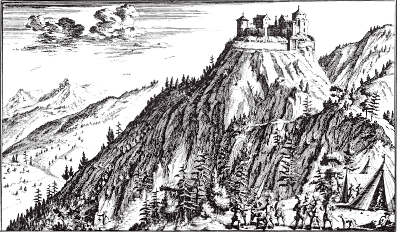 Belagerung der Ruine Uznaberg in Uznach durch Rudolf von Habsburg 1268 im Verlauf der Regensberger Fehde. Stich aus dem Neujahrsblatt 1718 der Burgerbibliothek (Wasserkirche) Zürich. Überschrift: «Uznaberg das böse Raubhaus des Grafen von Toggenburg von den Züricheren wunderbarer weis eingenommen und zerstört A.o. 1268».